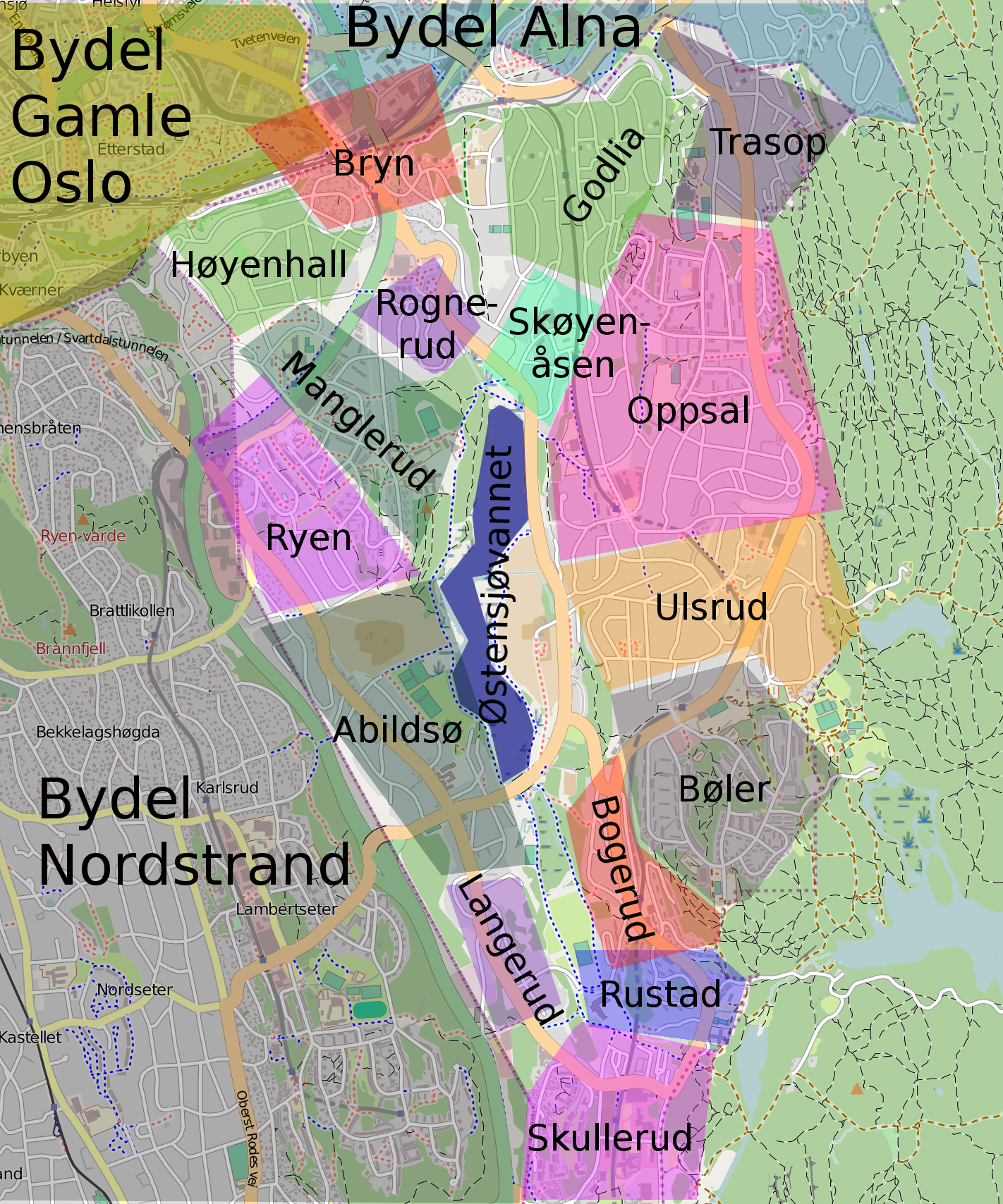 Norsk (bokmål): Omtrentlig inndeling av bydel Østensjø i boligstrøk. Merk at det alltid ligger noe skjønn til grunn for en strøksinndeling.